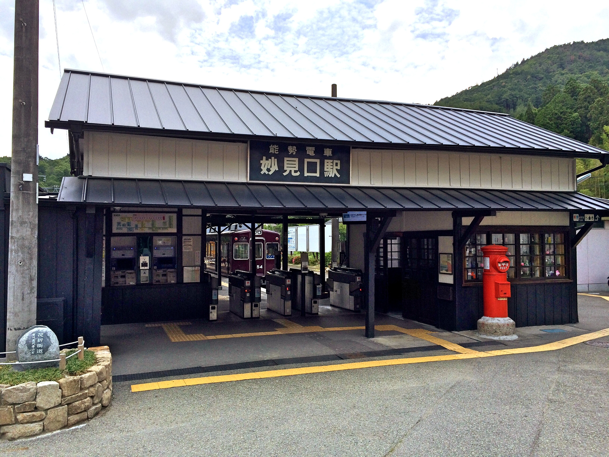 能勢電鉄妙見口駅舎